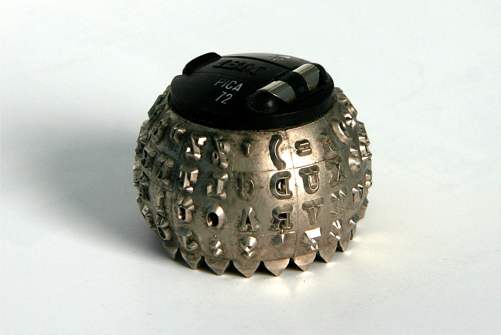 IBM-Kugelkopf (2. Generation); Gewicht des Kugelkopfs: ca 10 g; Durchmesser: ca. 35 mm